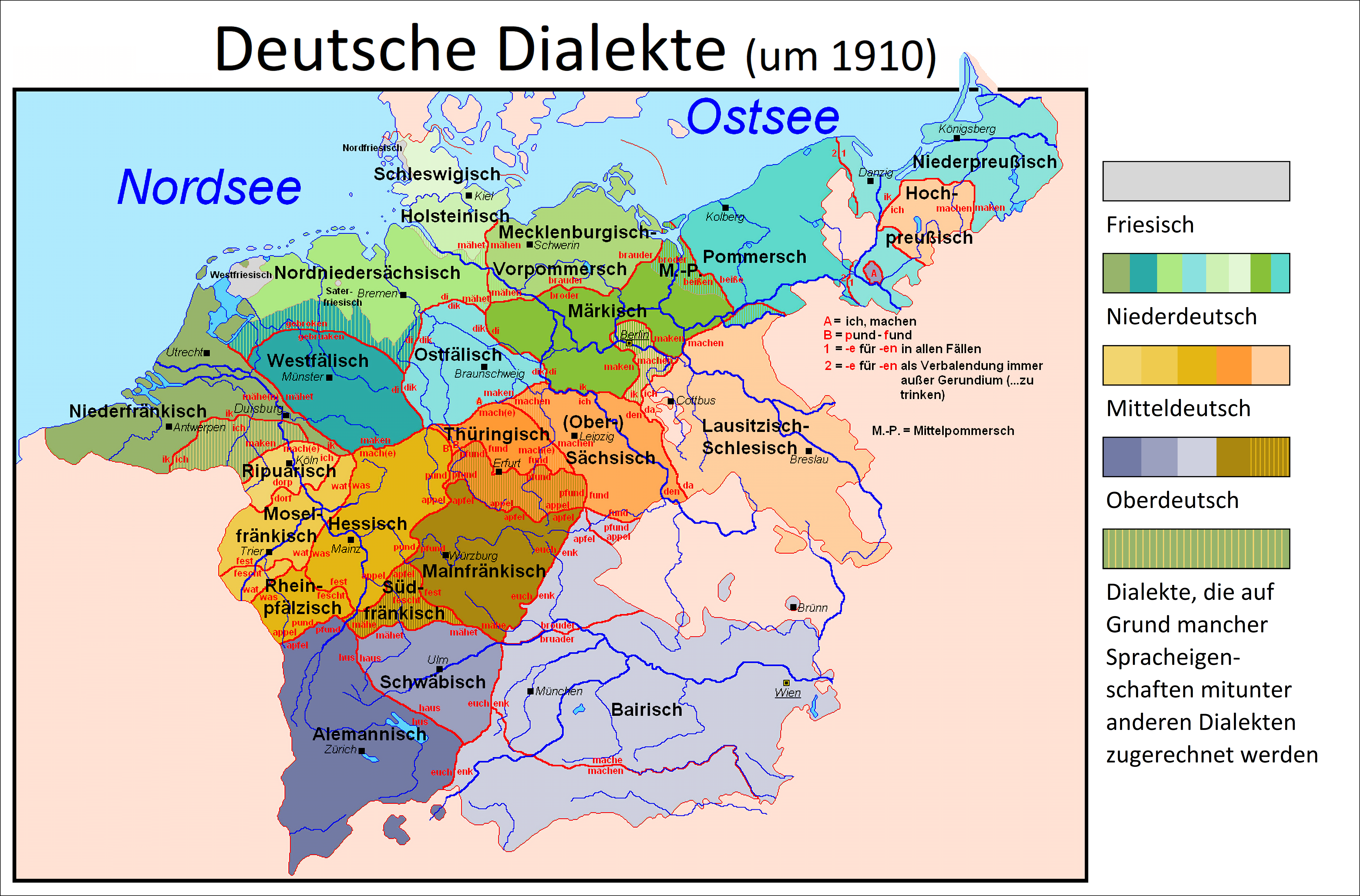 Das Verbreitungsgebiet der deutschen und niederländischen Dialekte um 1910